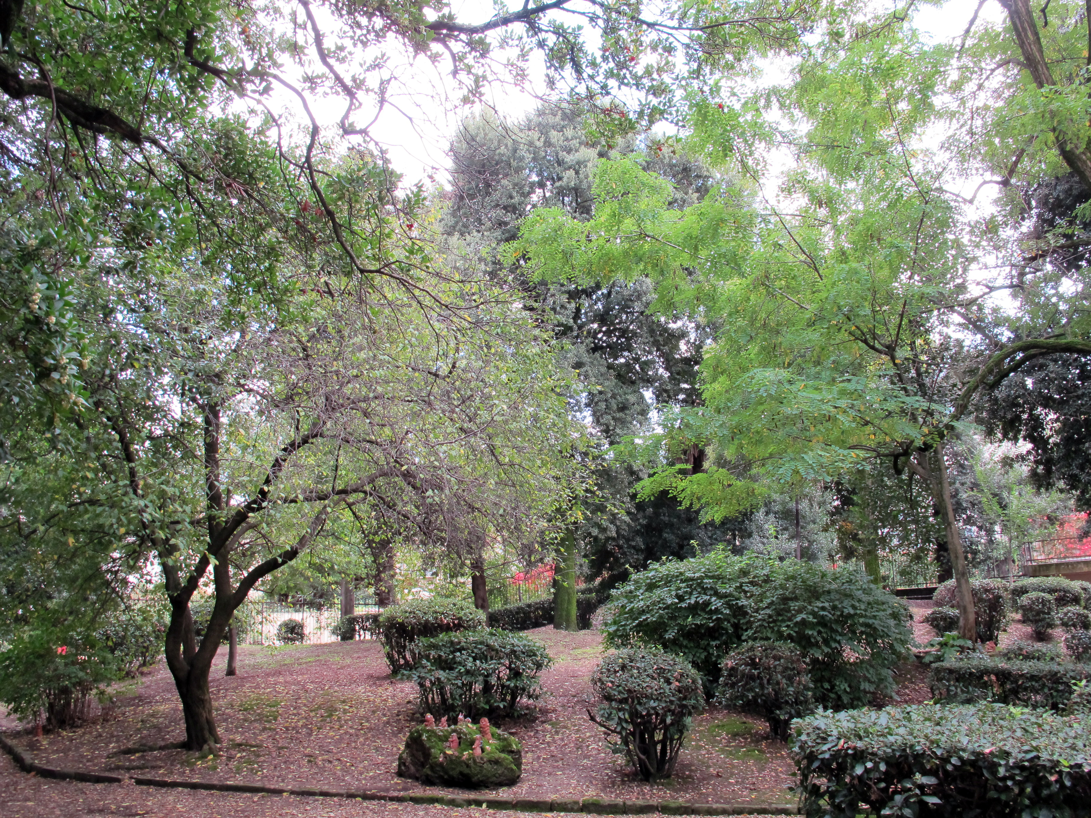 Borgo Pinti, Firenze